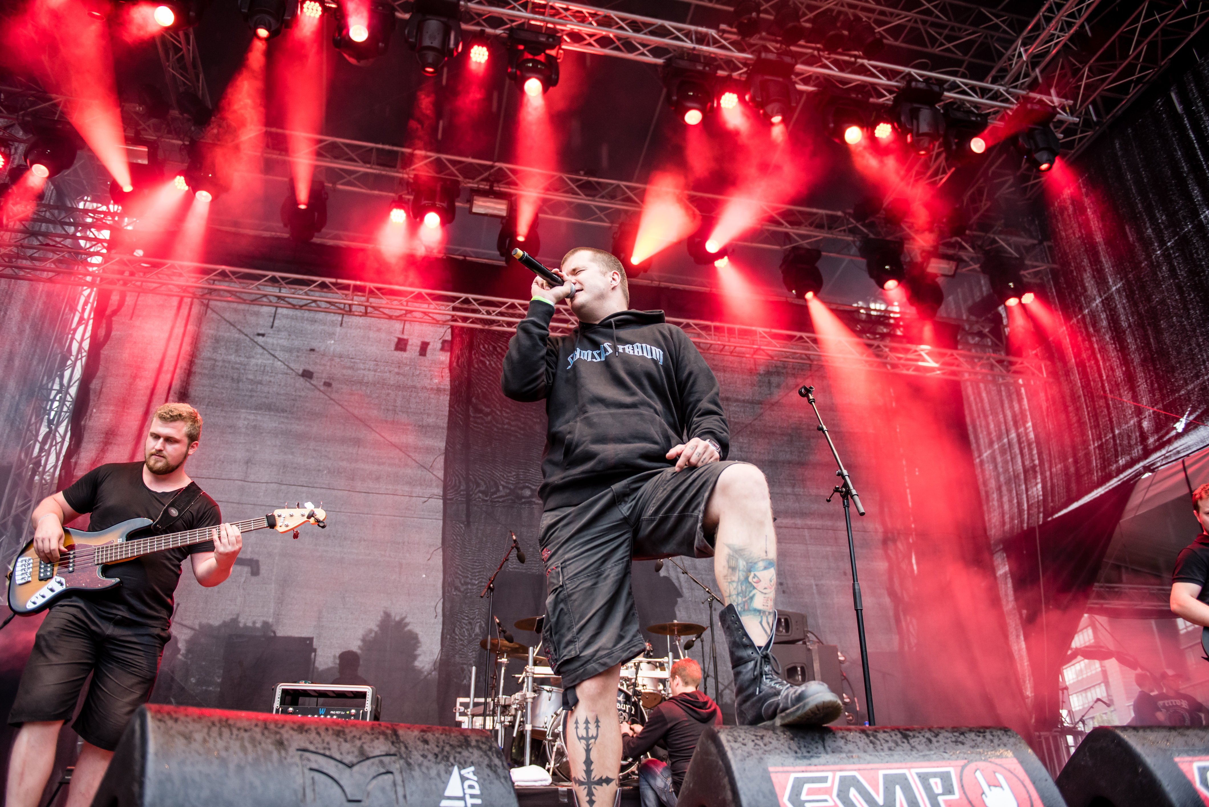 'Amphi Festival 2015; Köln - Lanxess Arena': 'Samsas Traum'